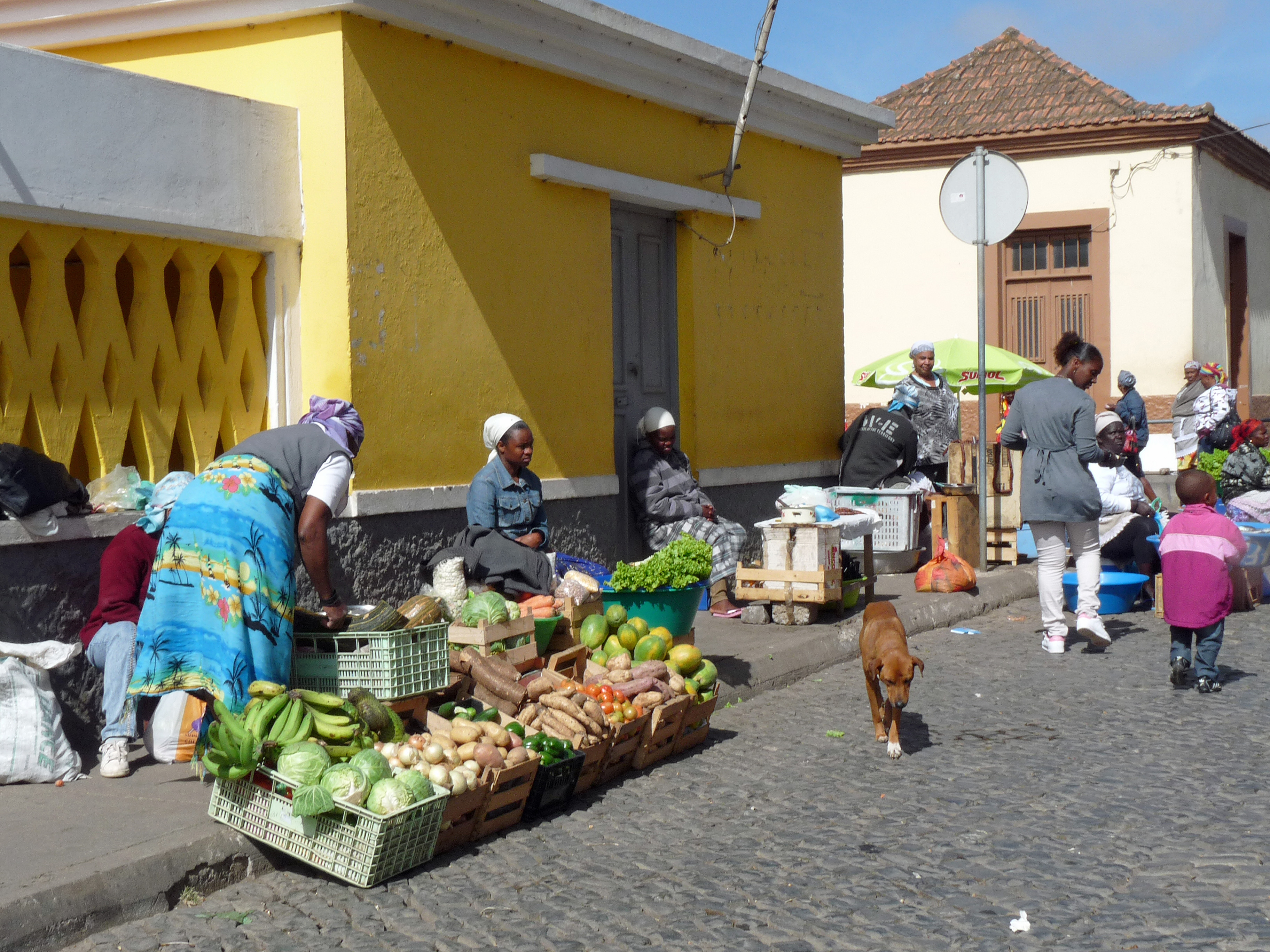 Assomada (île de Santiago, Cap-Vert) : vente de fruits et légumes aux abords du marché (fermé à ce moment-là)